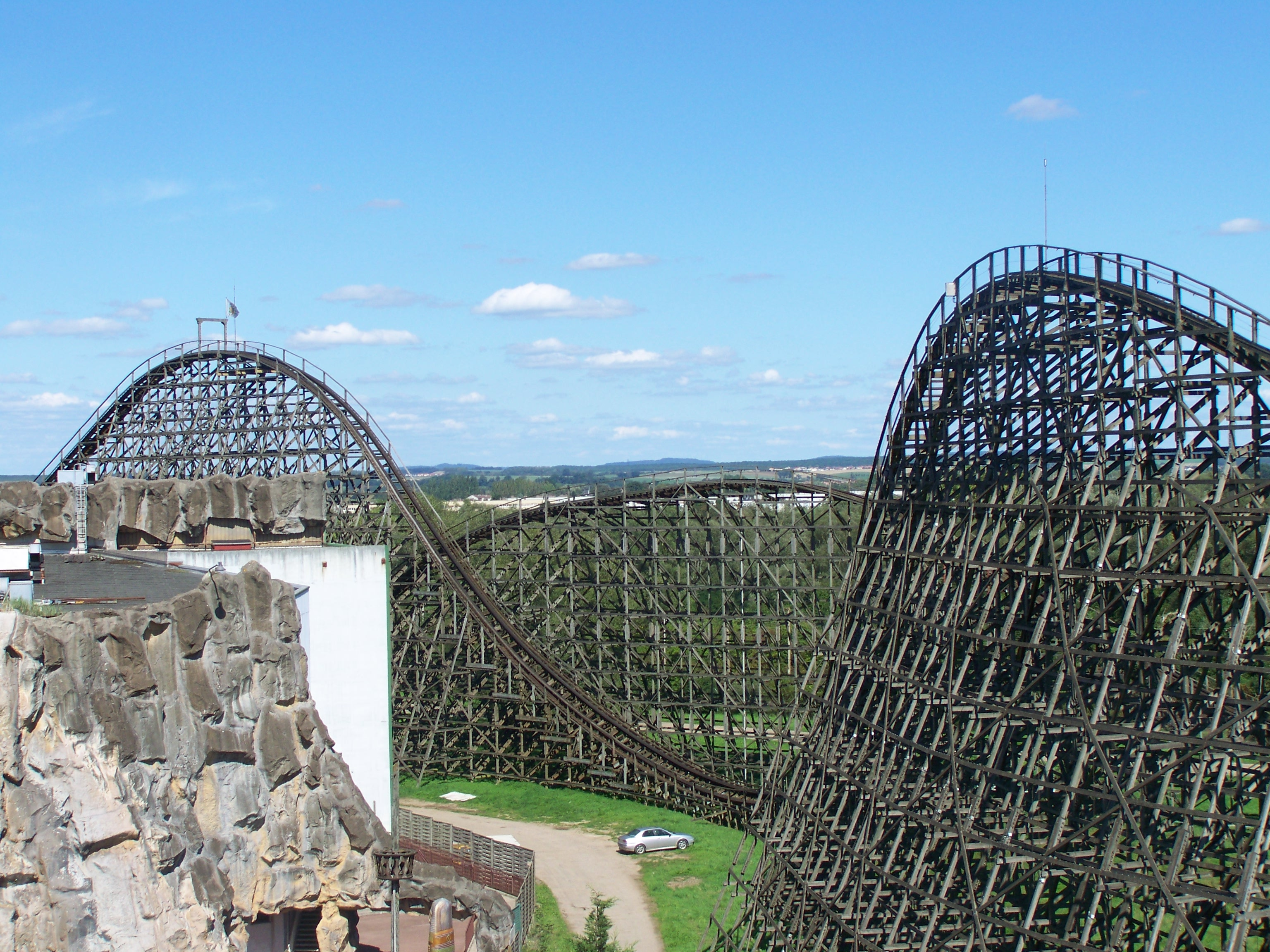 photo 2011 anaconda walygator